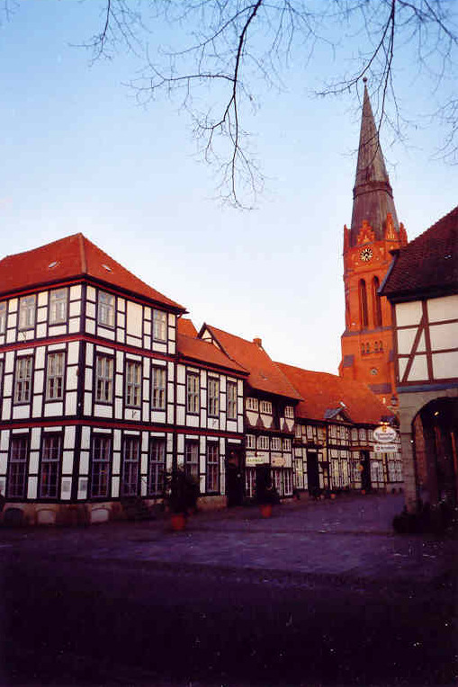 Die St.-Martins-Kirche in Nienburg/Weser, Ansicht von Westen